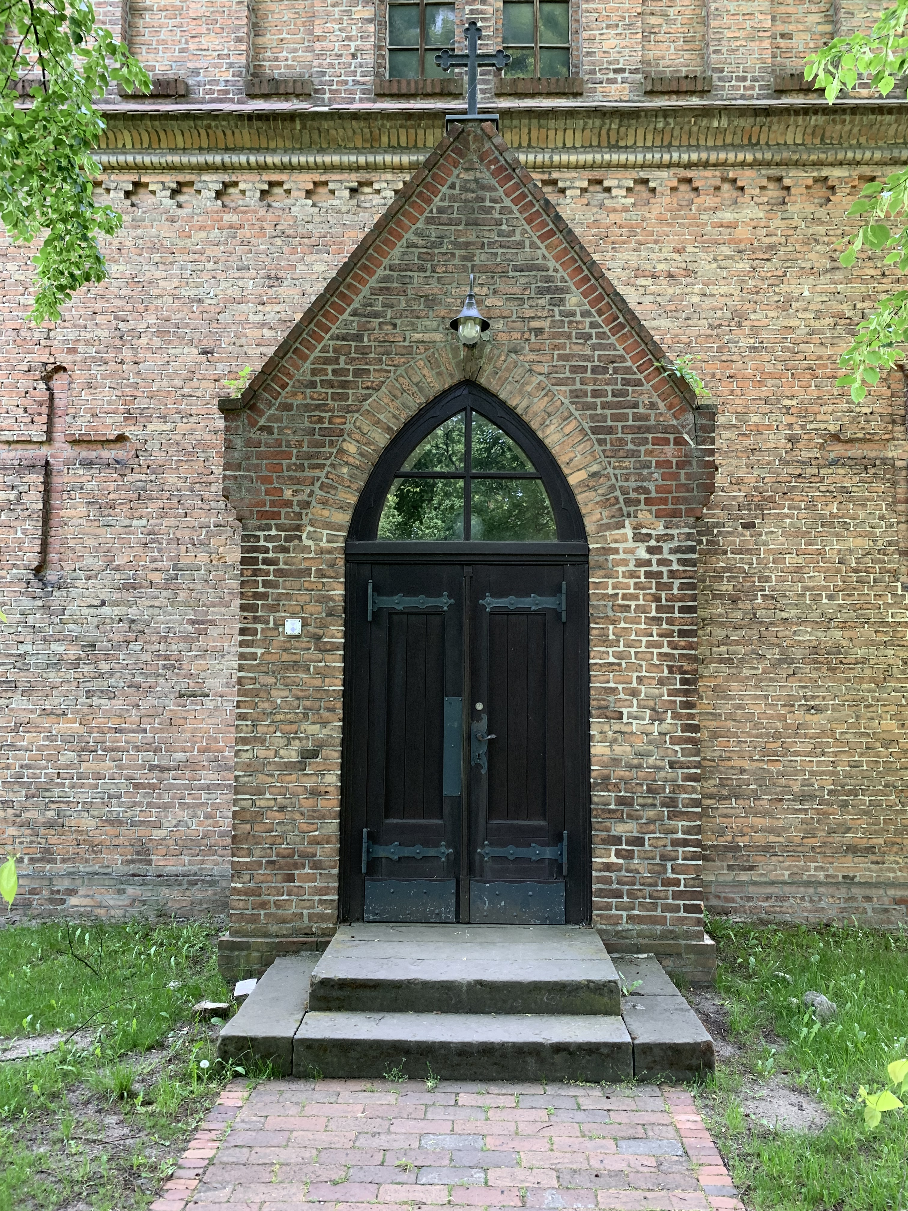 Die Dorfkirche Schuzendorf der gleichnamigen Gemeinde im Landkreis Dahme-Spreewald ist eine neugotische Saalkirche aus der zweiten Hälfte des 19. Jahrhunderts.